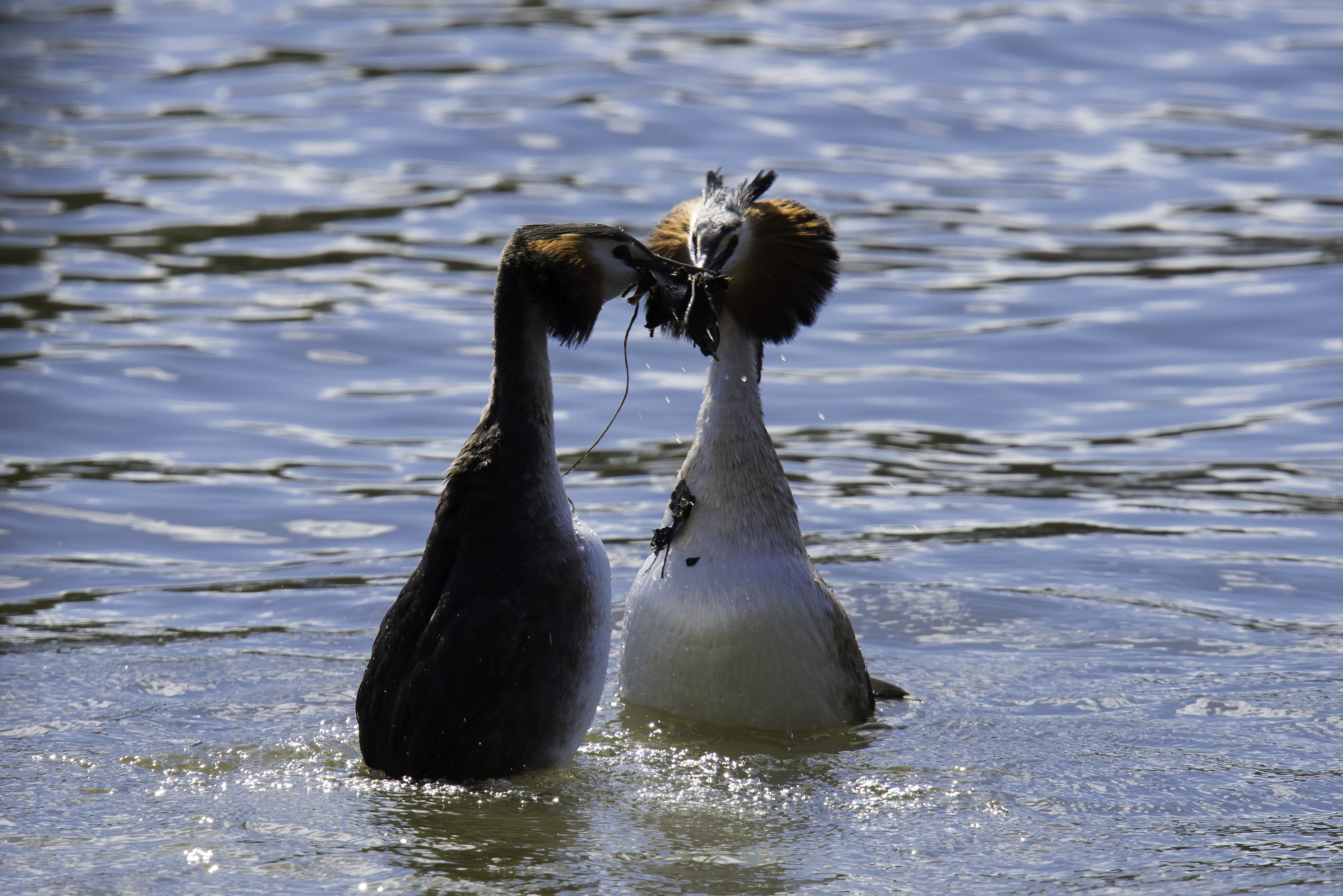 Haubentaucher auf dem Rhein